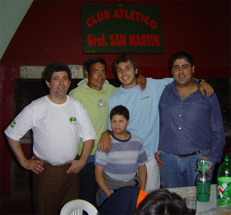 bela jugando